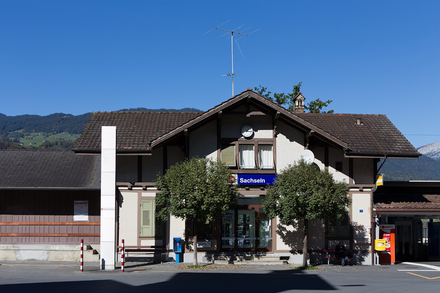 Bahnhofsgebäude von Sachseln